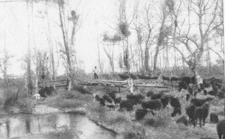 Pastor con rebaño de ovejas - Pedraza de Yeltes (Salamanca) - España Turística y Monumental / Cuarto álbum / Las Bellezas de Castilla / Región Leonesa - Cromo 70 x 50 Sepia